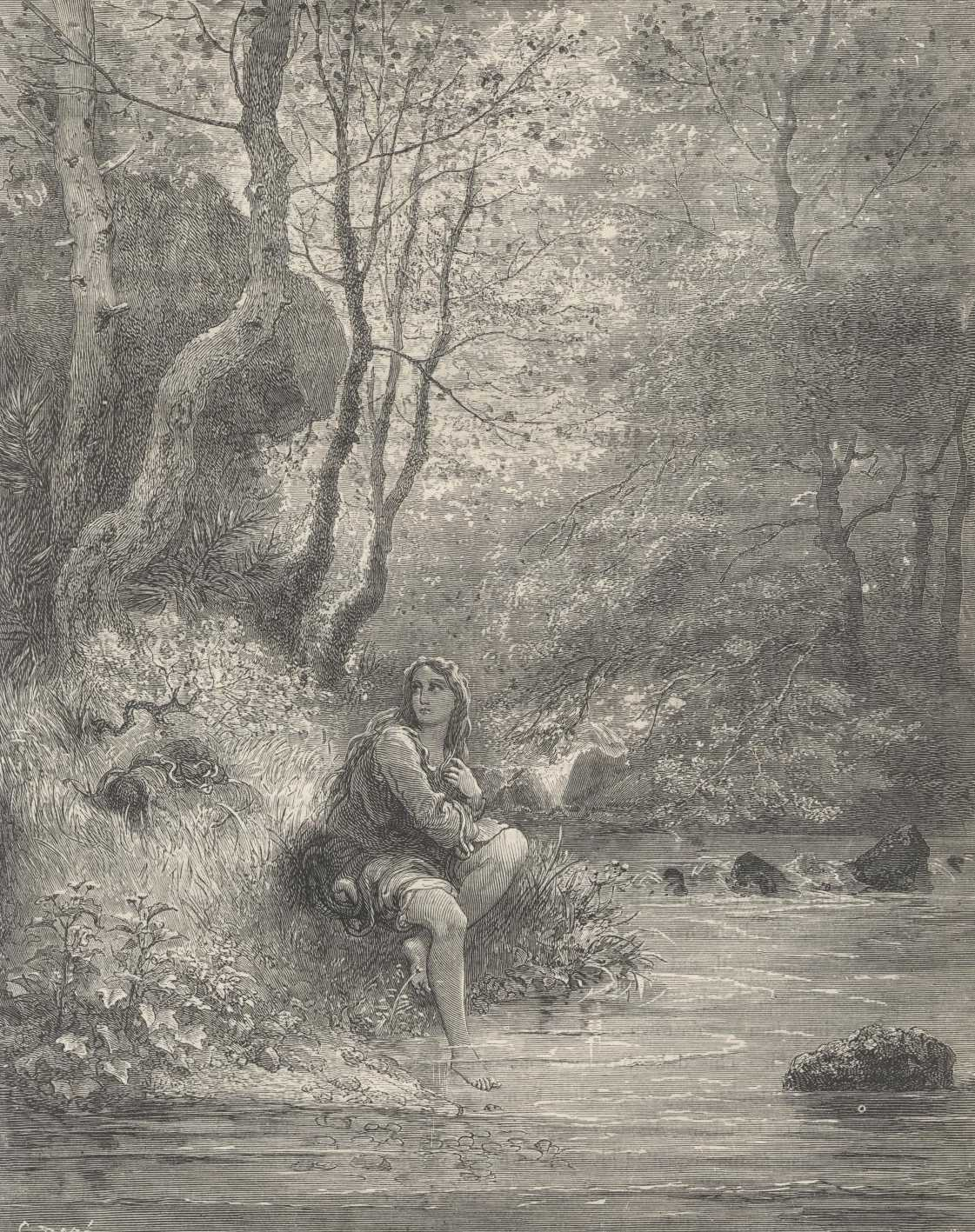 Ilustração de Gustave Doré para a edição de 1863 de "Dom Quixote" de Miguel de Cervantes